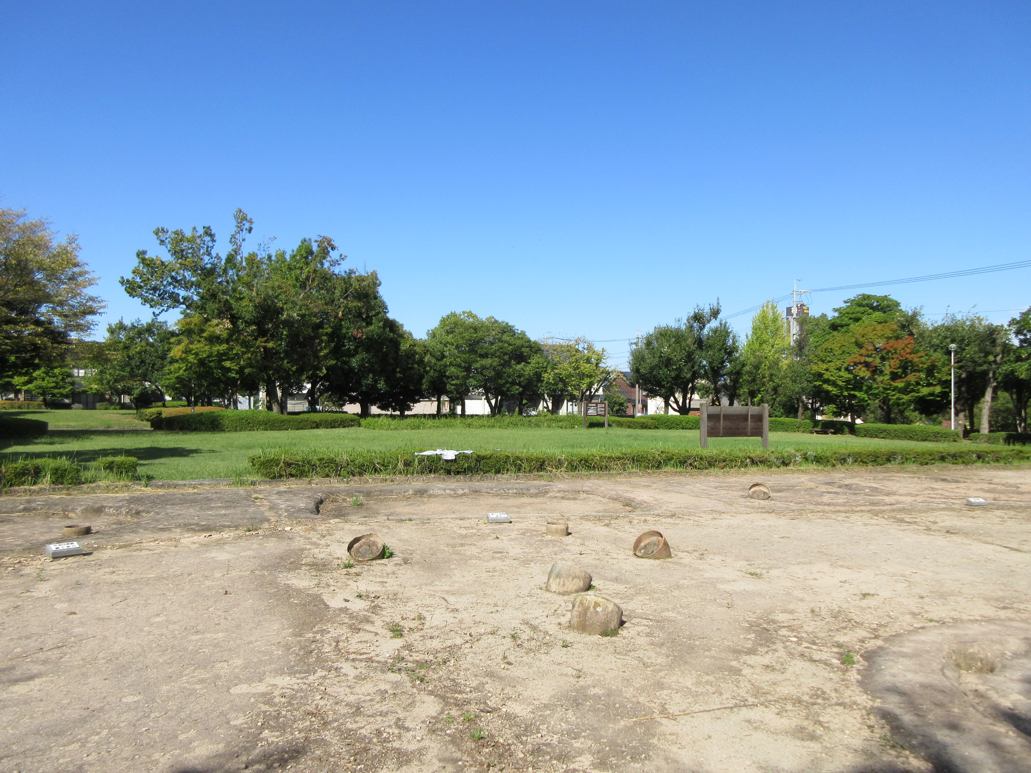 真宮遺跡公園（岡崎市真宮町、六名）